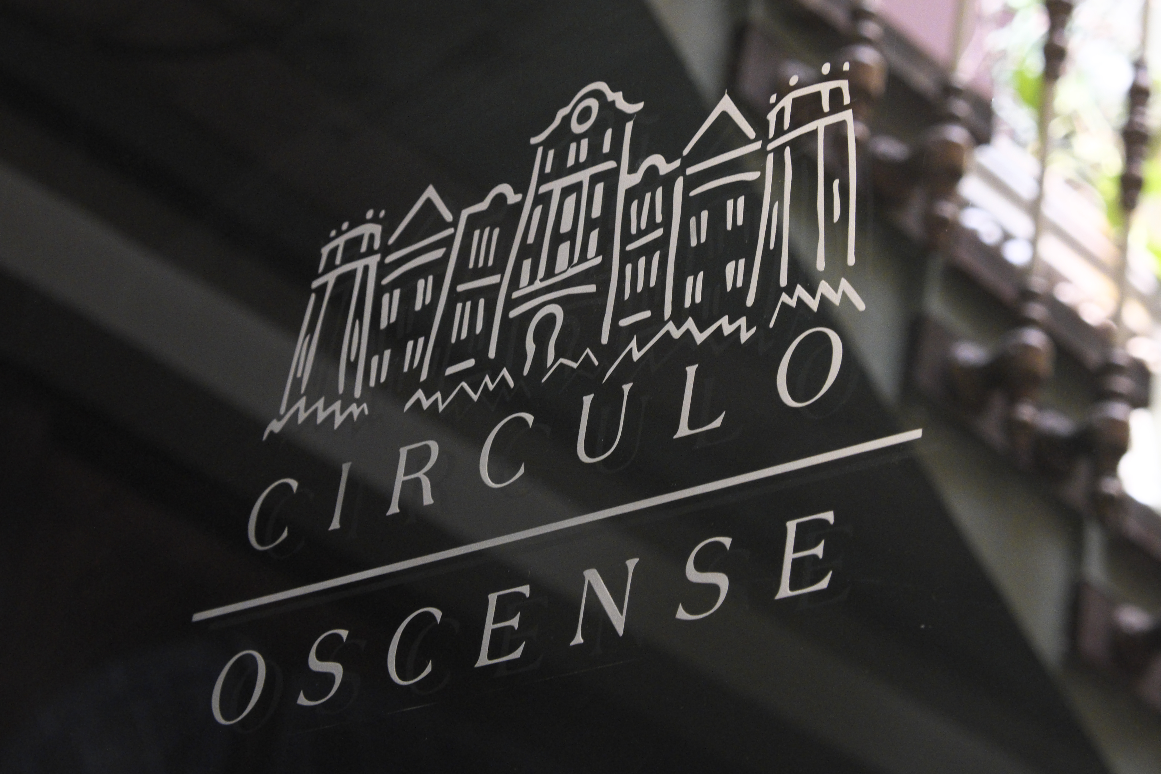 Casino de Huesca, auch Círculo Oscense, in Huesca (Aragón/Spanien)